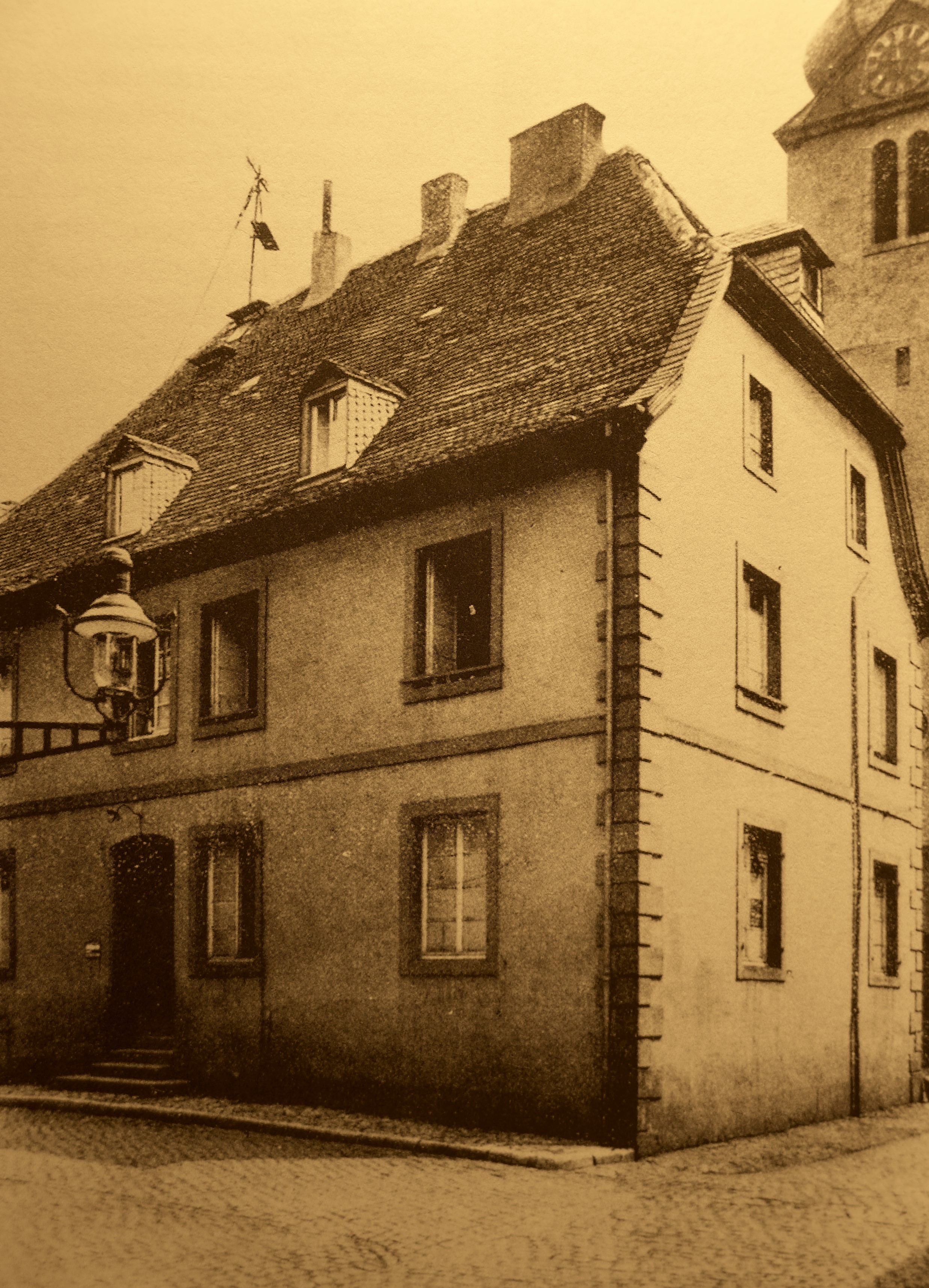 Altes Rathaus in St. Johann neben der Evangelischen Kirche am Ende des 19. Jahrhunderts (Stadtarchiv Saarbrücken)